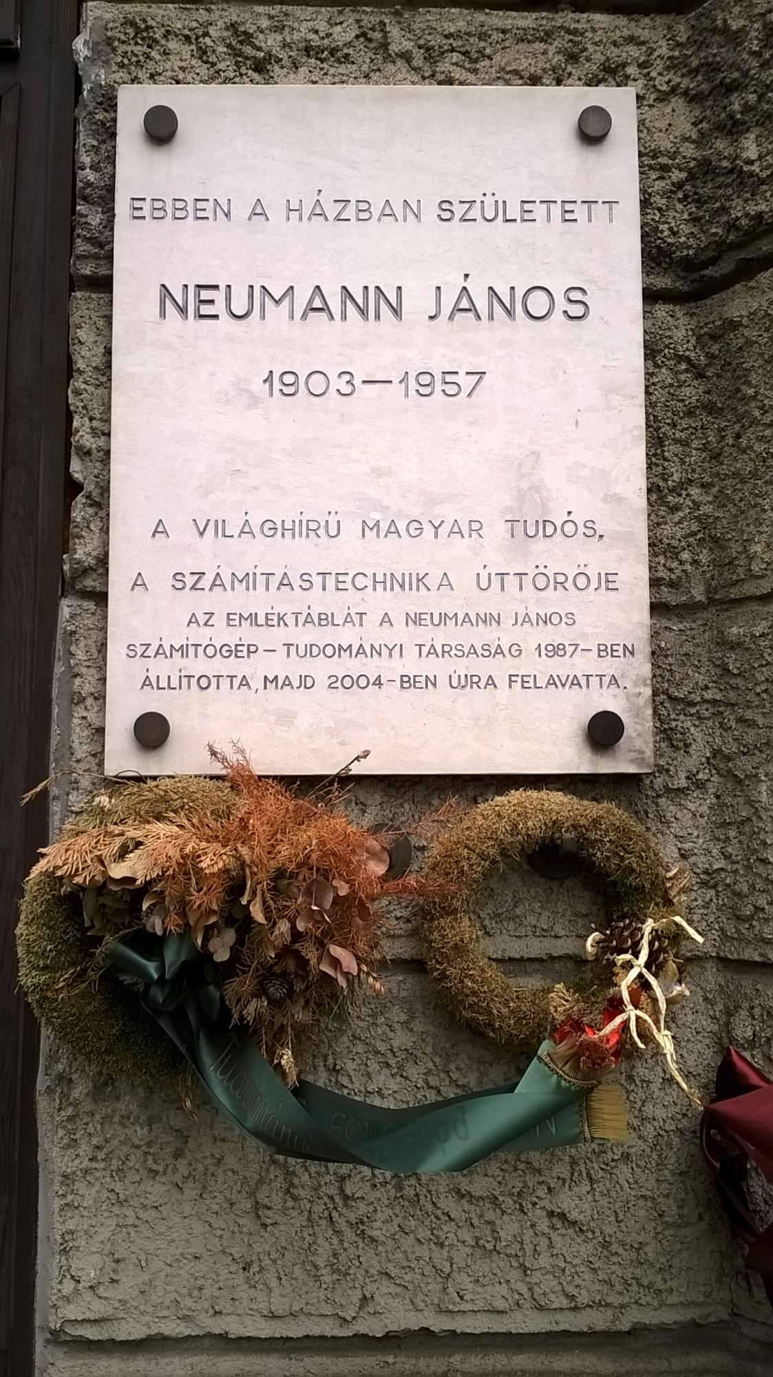 Neumann János emléktáblája a szülőháza falán, Budapest 5. ker. Báthory u. 26. Állíttatta: Neumann János Számítógép-tudományi Társaság 1987-ben. Felirata: „Ebben a házban született Neumann János (1903-1957), a világhírű magyar tudós, a számítástechnika úttörője. Az emléktáblát a Neumann János Számítógép-tudományi Társaság 1987-ben állította, majd 2004-ben újra felavatta.”